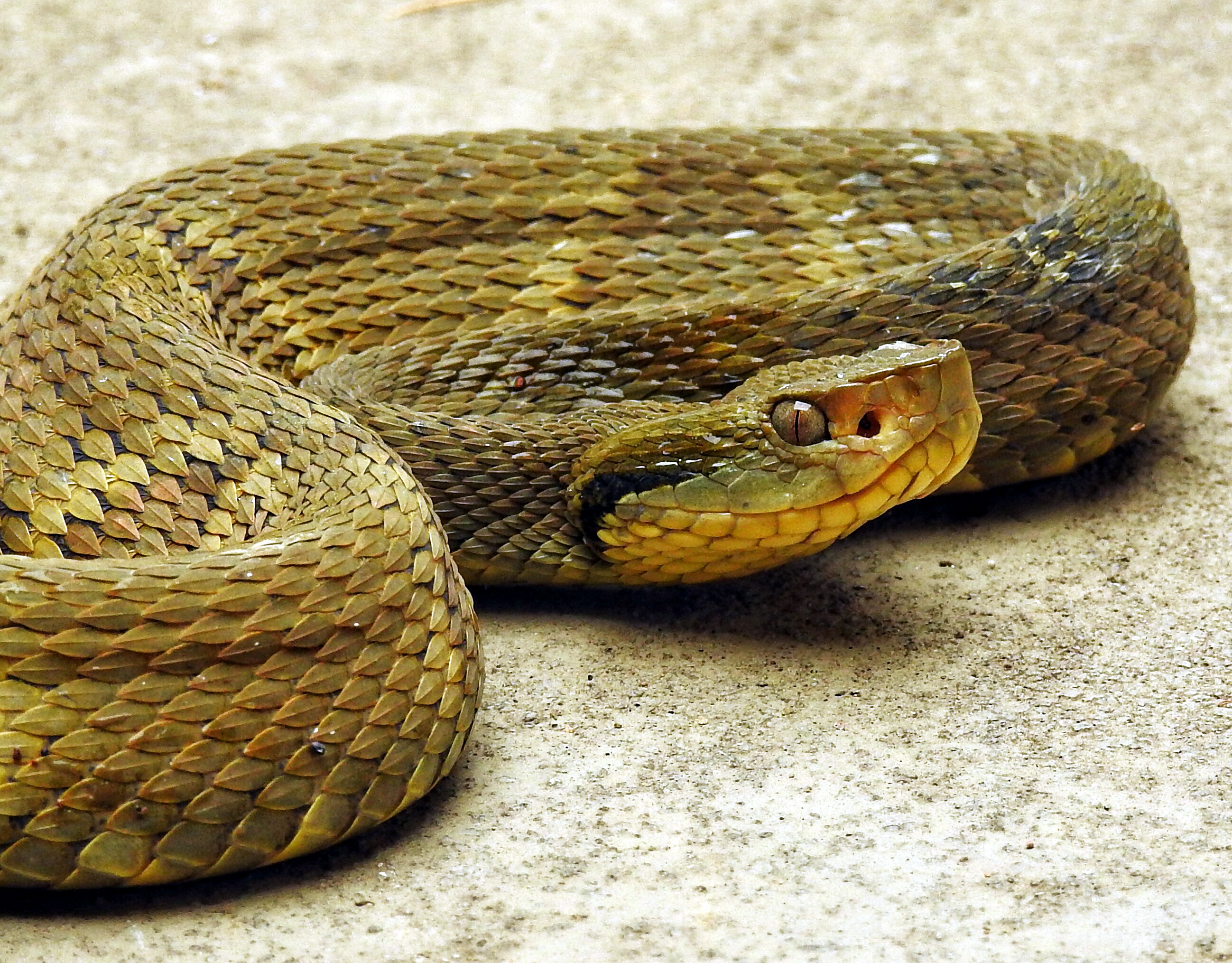 Popularmente conhecida como Jararaca. Serpente fotografada em Viçosa, Minas Gerais.